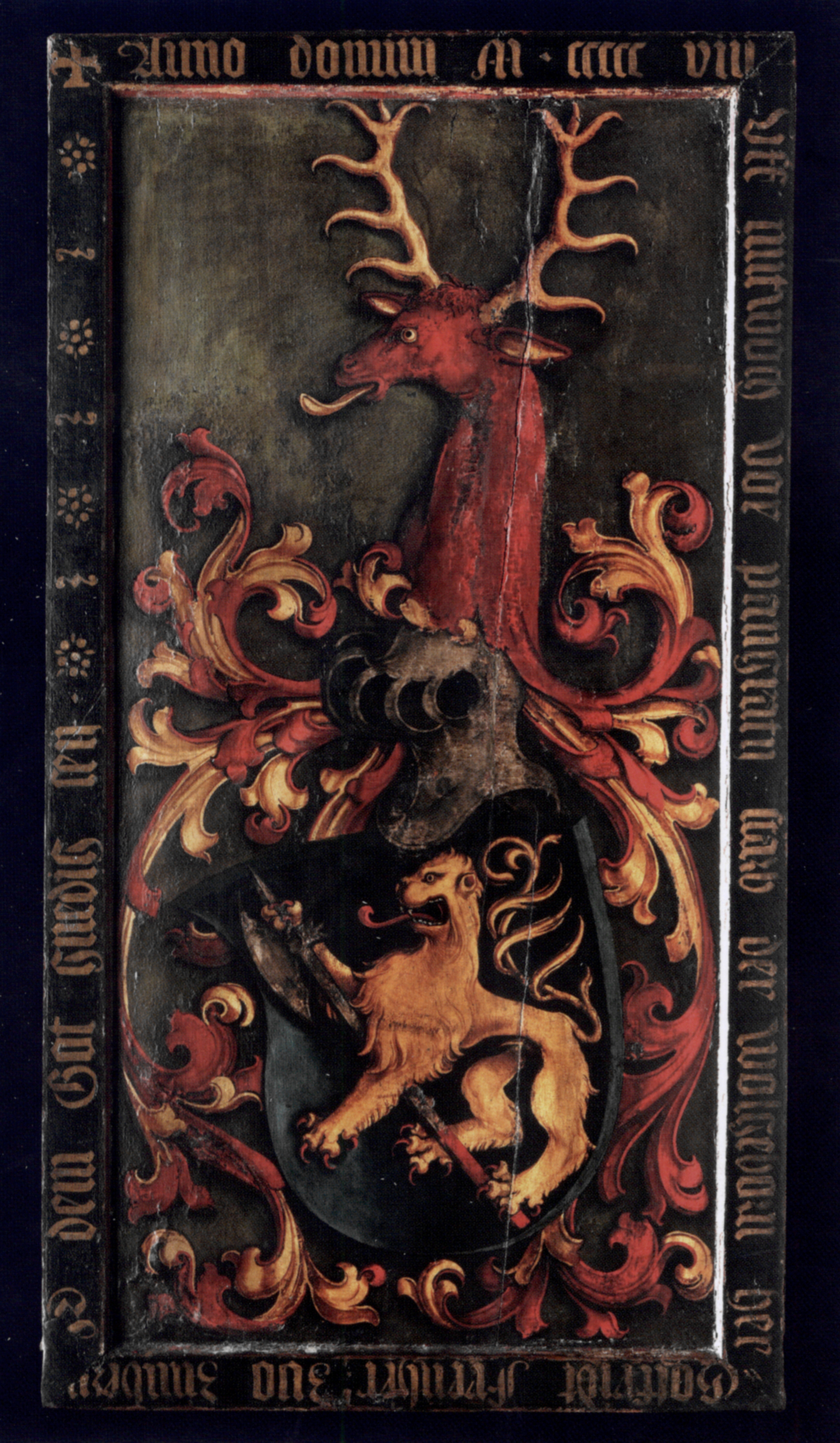 Totenschild des Freiherrn Gottfried von Zimmern (1425–1508); datiert 1508, Öltempera auf Holz, 55 x 111 cm; Landesmuseum Zürich